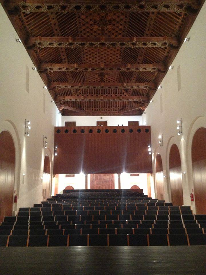 Antigua Iglesia y Convento de Santo Domingo hoy Teatro Oscense